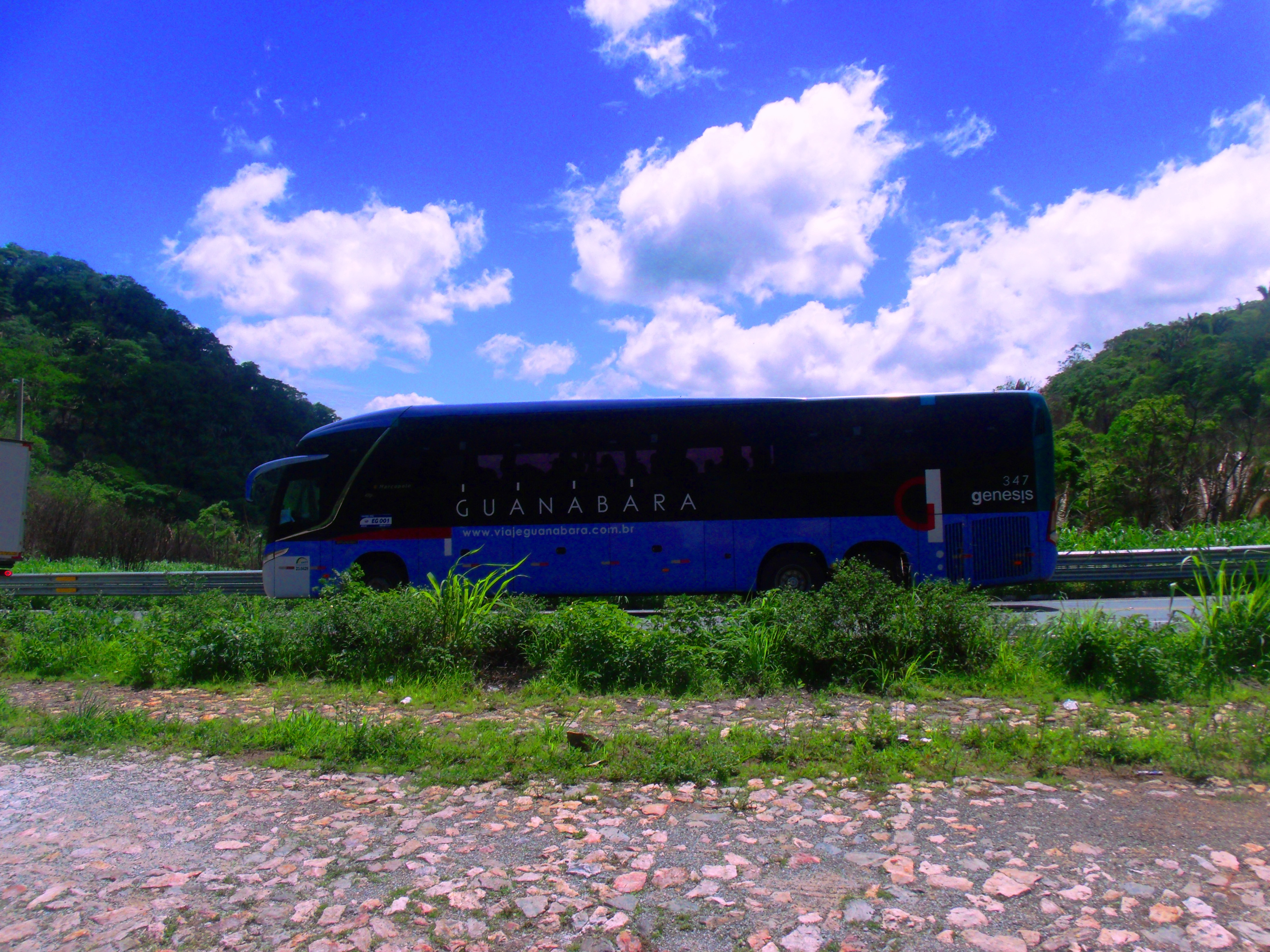 Ladeira da serra grande ou Serra da Ibiapaba, Aí é um ônibus da Expresso Guanabara.